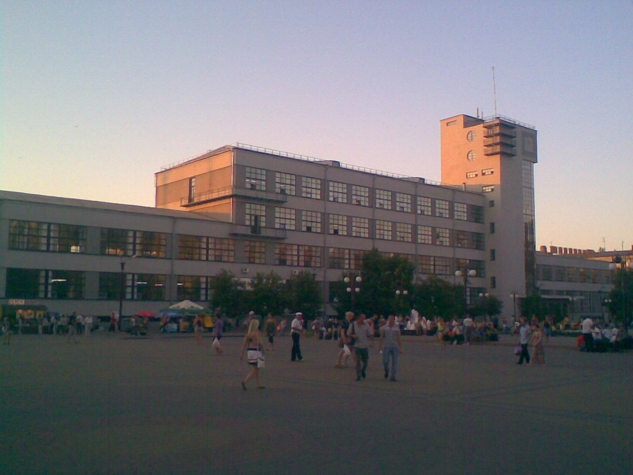 Здание бывшего Главпочтамта на Привокзальной площади Харькова